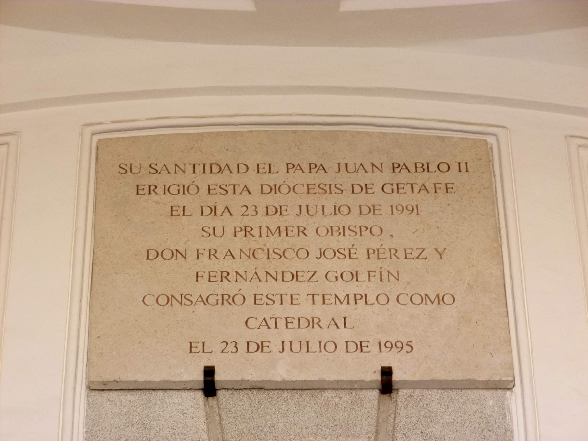 Catedral de Nuestra Señora de la Magdalena (Getafe, Madrid)